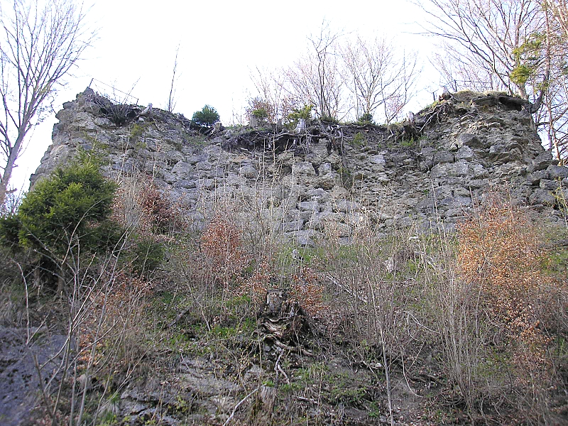 Burg Hugofels bei Immenstadt im Allgäu (Landkreis Ostallgäu, Bayerisch-Schwaben). Der Hauptturm von Süden. Eigene Aufnahme, April 2008 / Hugofels castle near Immenstadt im Allgäu (Landkreis Ostallgäu, Bavaria, Germany). The keep from the south. Own photo, April 2008